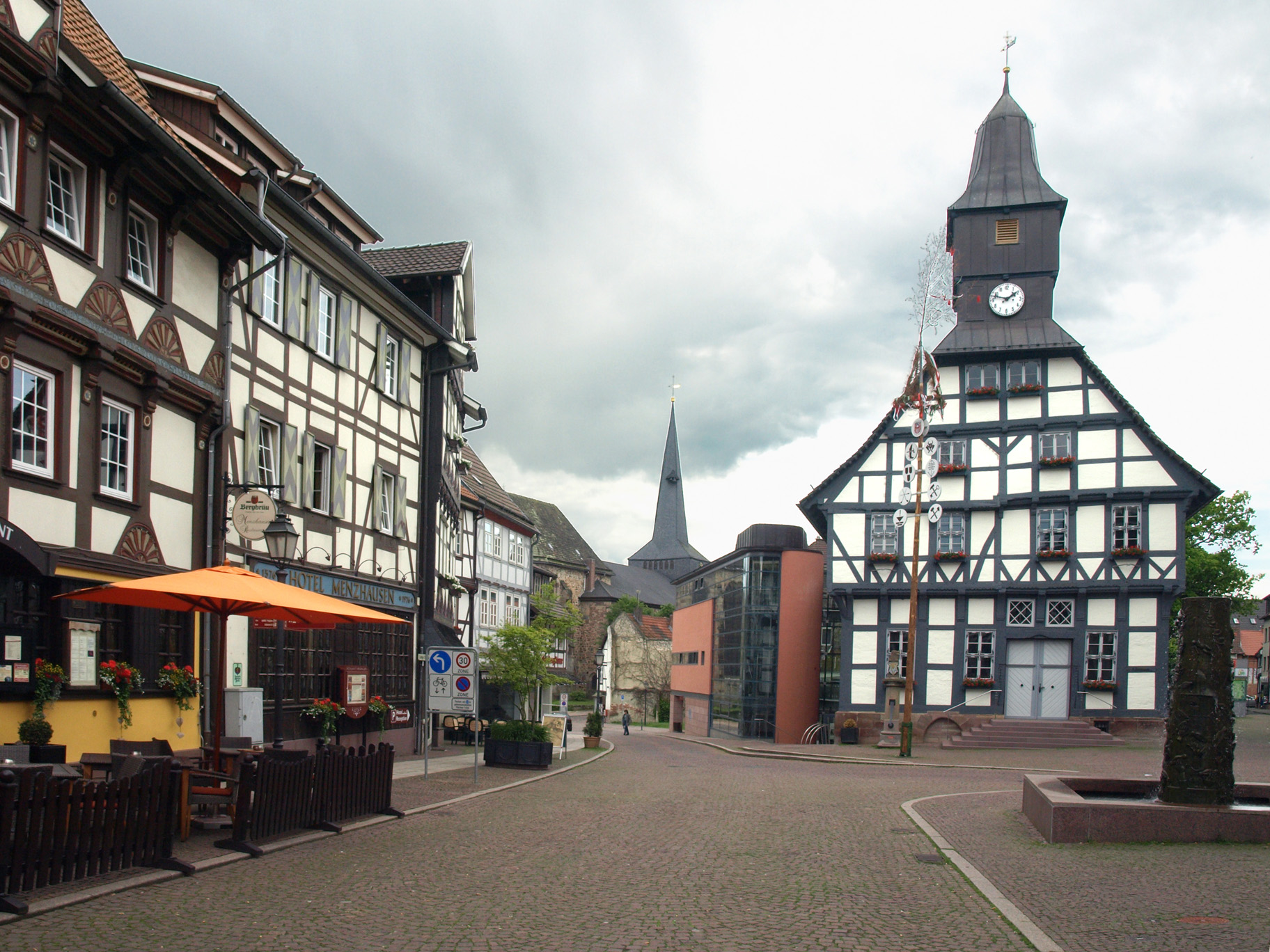 Uslar (Niedersachsen), Straßenszene im Zentrum- Lange Straße und Rathaus, Foto: 2012